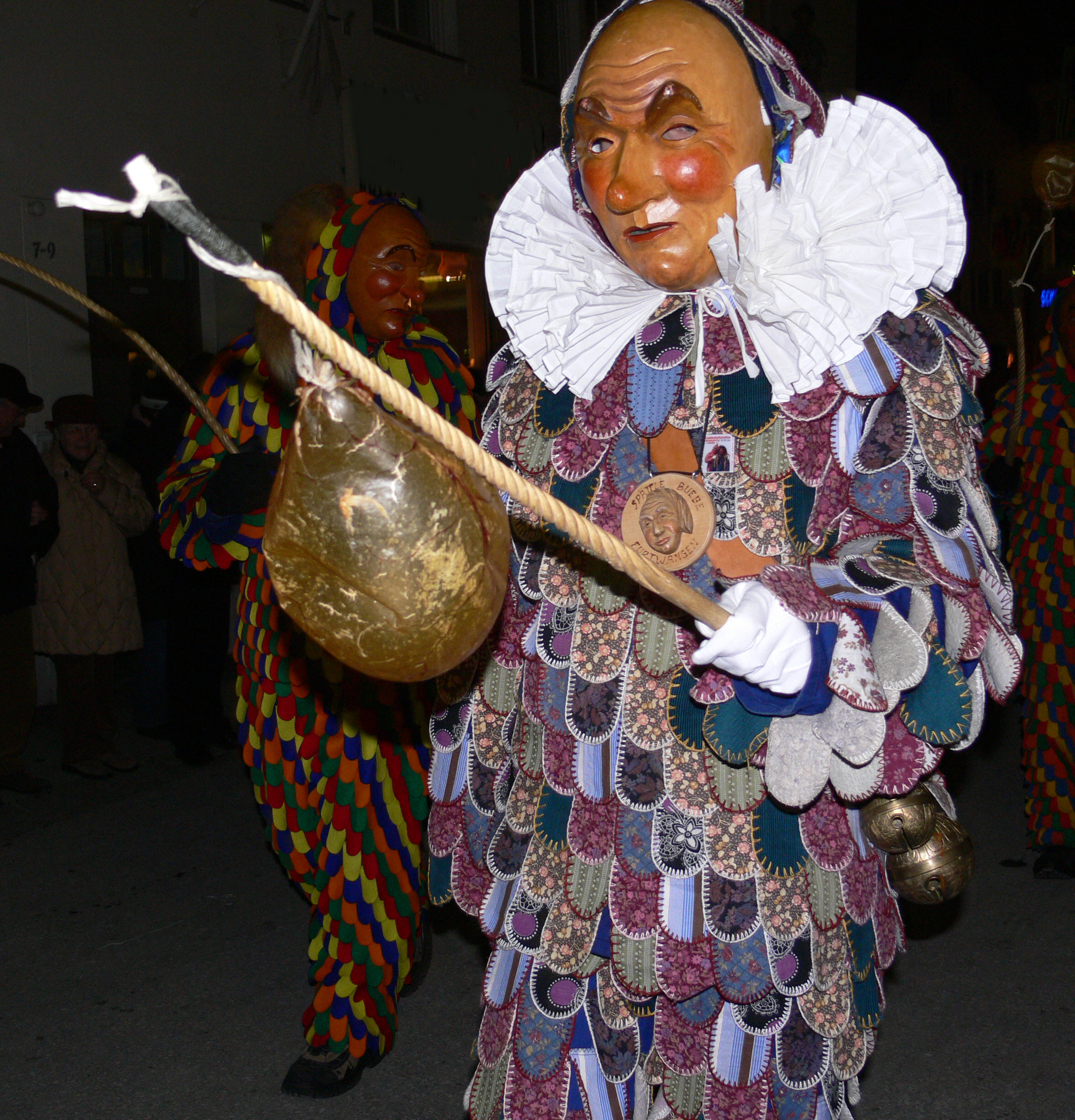 Narrenzunft Furtwangen, Figur: Spättle Veranstaltung: VSAN-Landschaftstreffen 2006 in Weingarten, Flecklesumzug